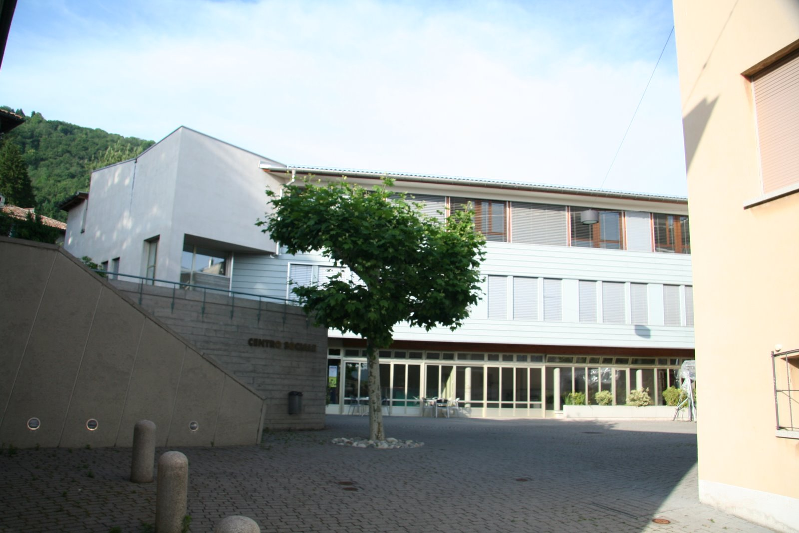 Piazzetta del Centro Sociale di Vacallo